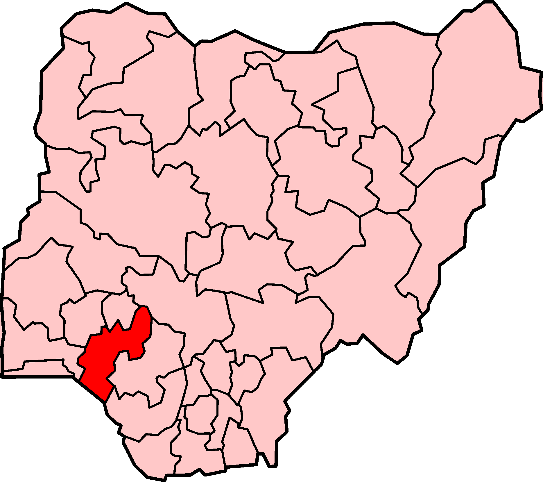 Localização do estado de Ondo na Nigéria.